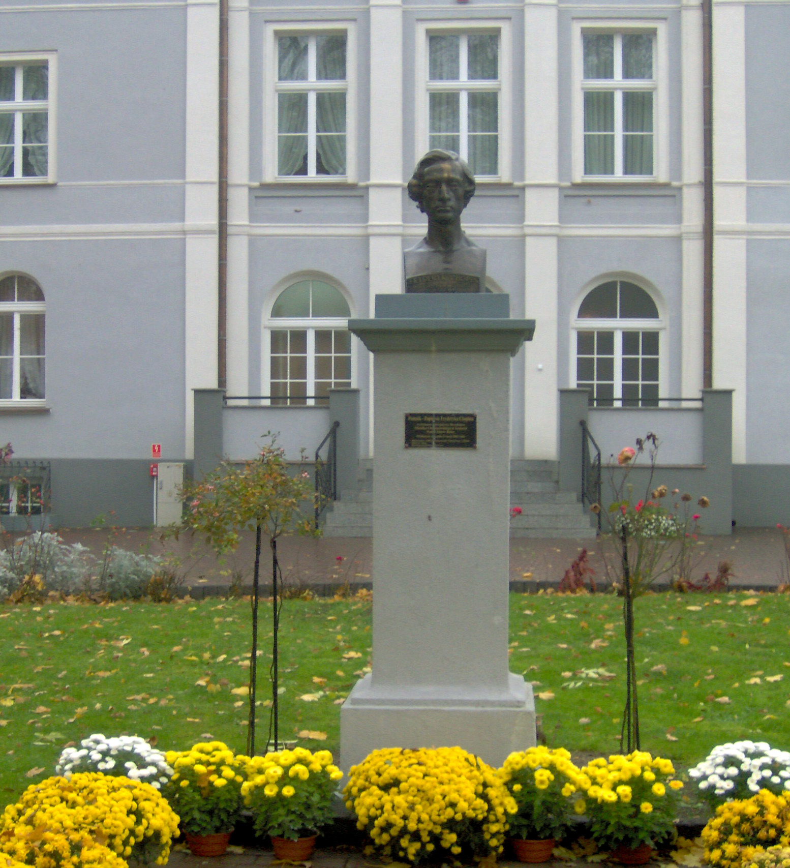 Frédéric Chopin memorial in Szafarnia